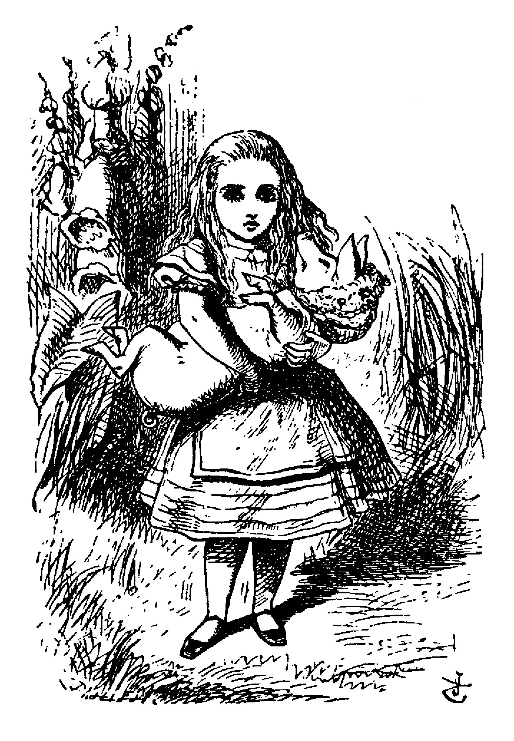 Alice’s Abenteuer im Wunderland Übersetzer: Antonie Zimmermann Orginal Titel: Alice's Adventures in Wonderland Illustrationen: John Tenniel